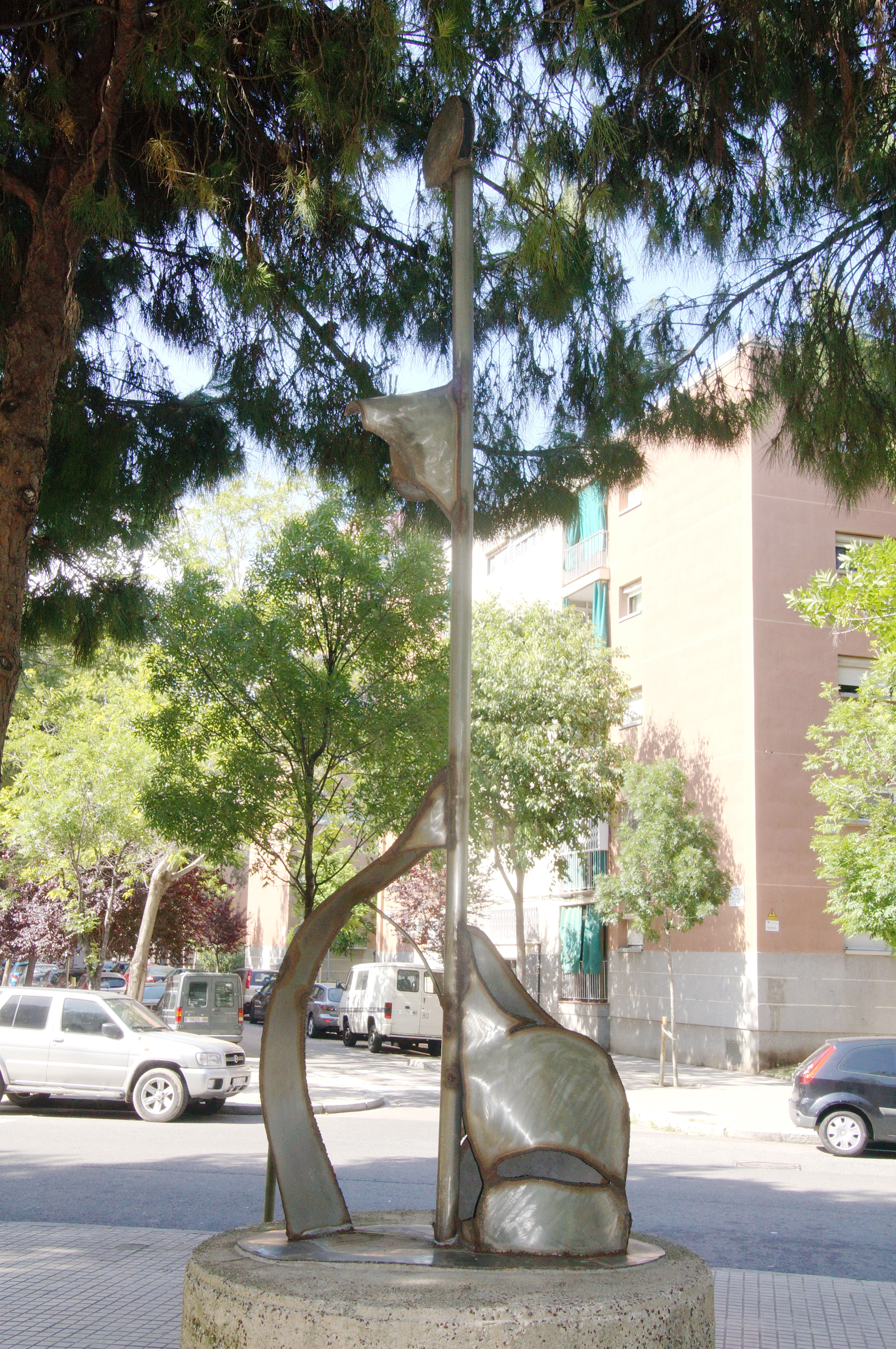 Contrapunt (Ferran Soriano). C. Concili de Trento, 340 (Barcelona)